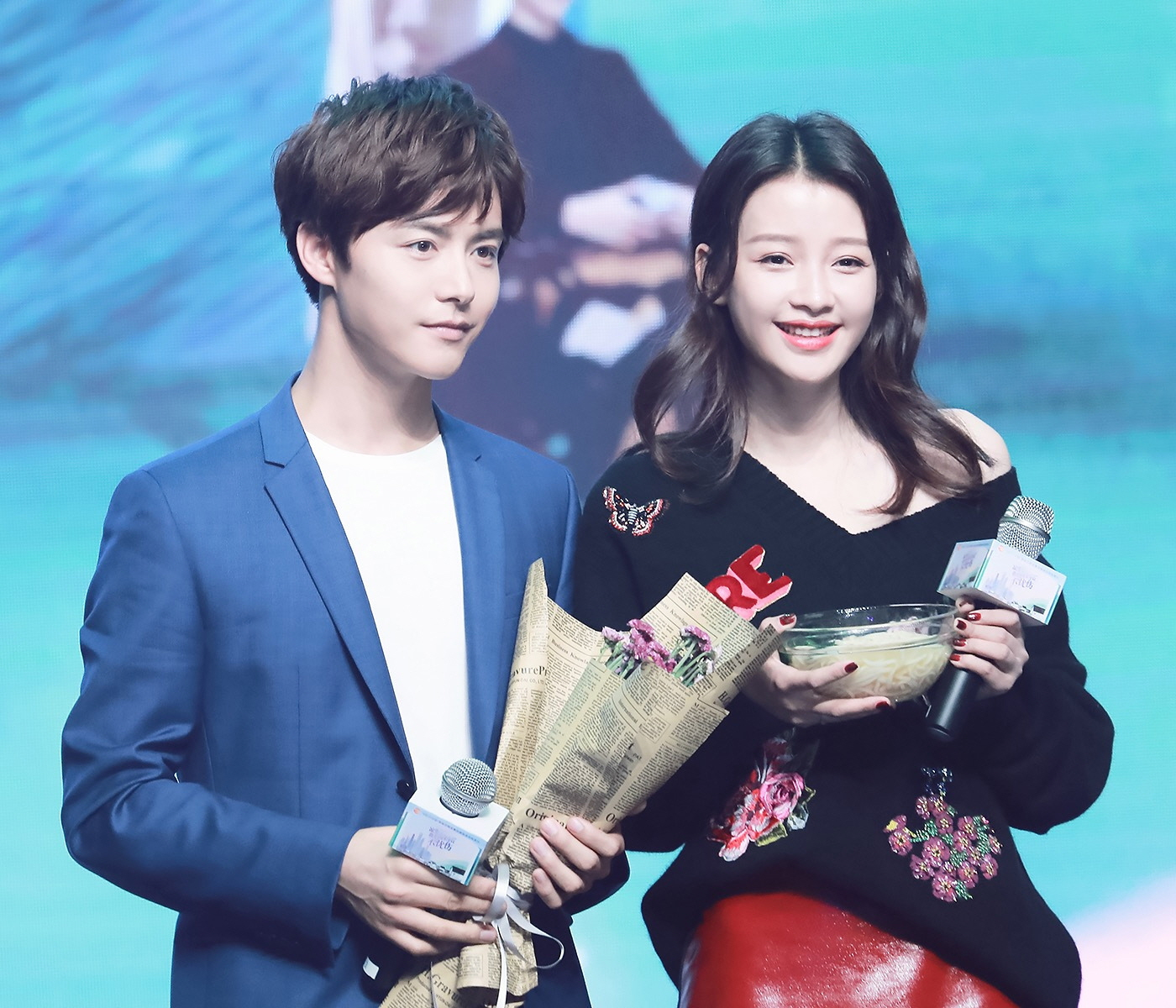 180915 凉生我们可不可以不忧伤 开播发布会